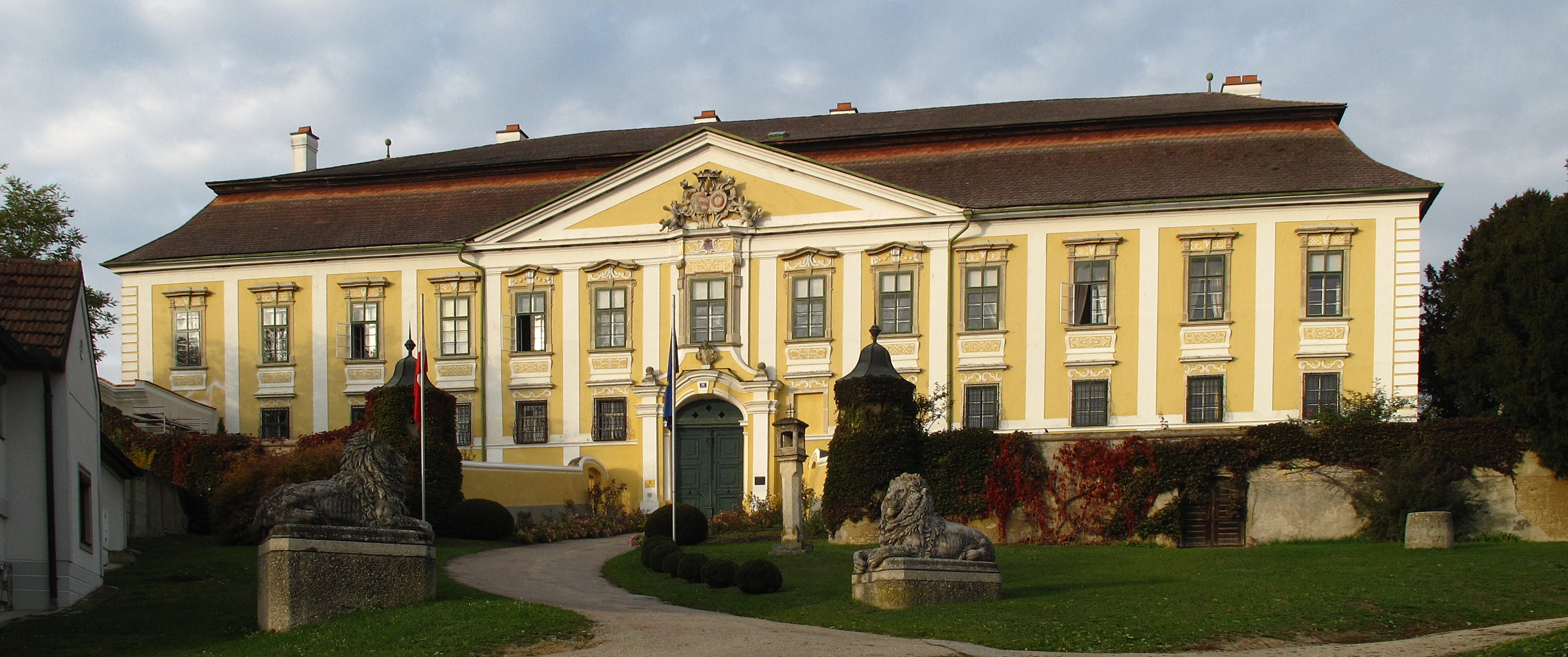 Schloss Gobelsburg, 3550 Gobelsburg, Schloss Straße 16